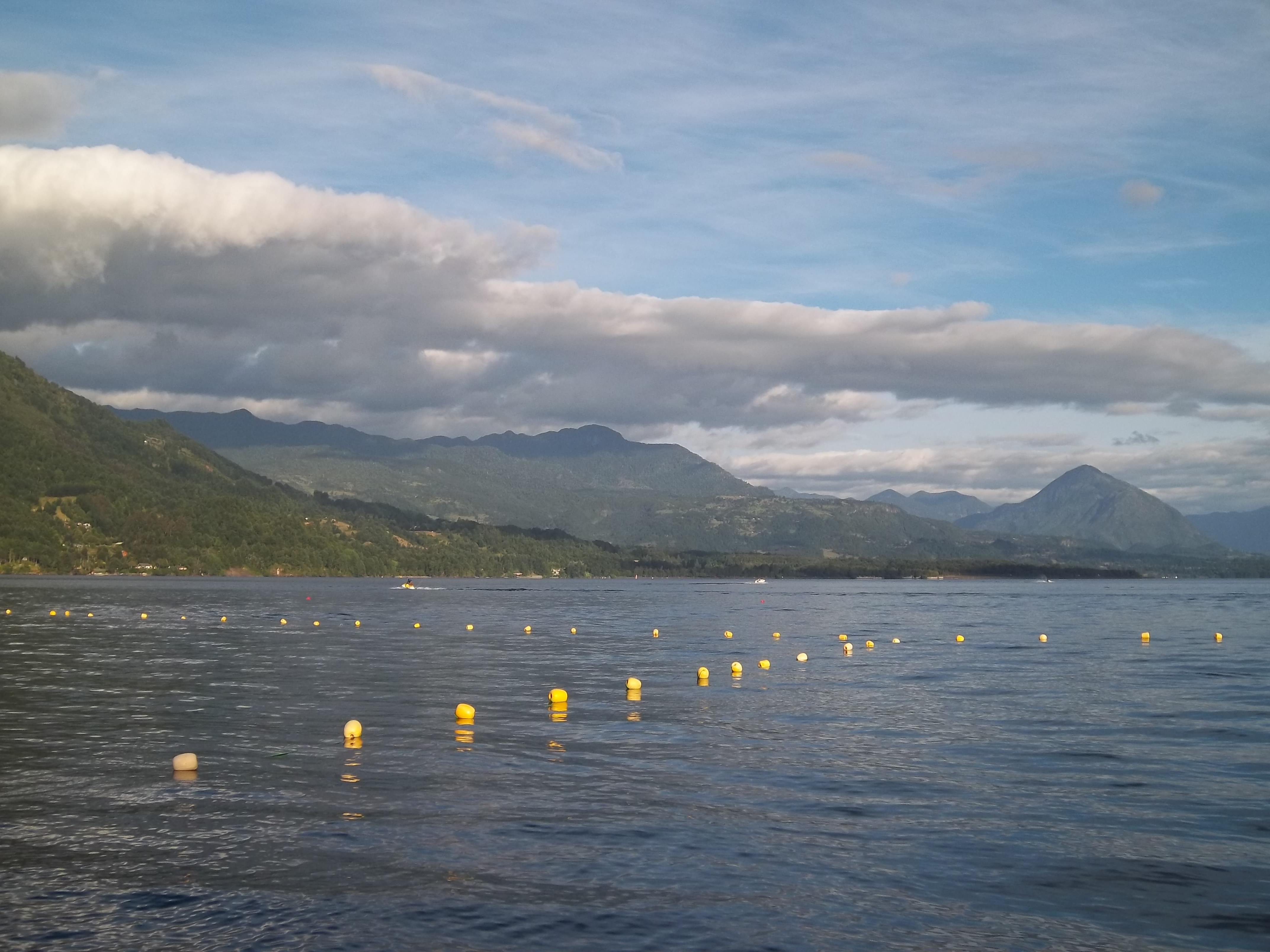 Lago Calafquén desde la Playa Chica de Lican Ray, en la región de la Araucanìa, Chile.